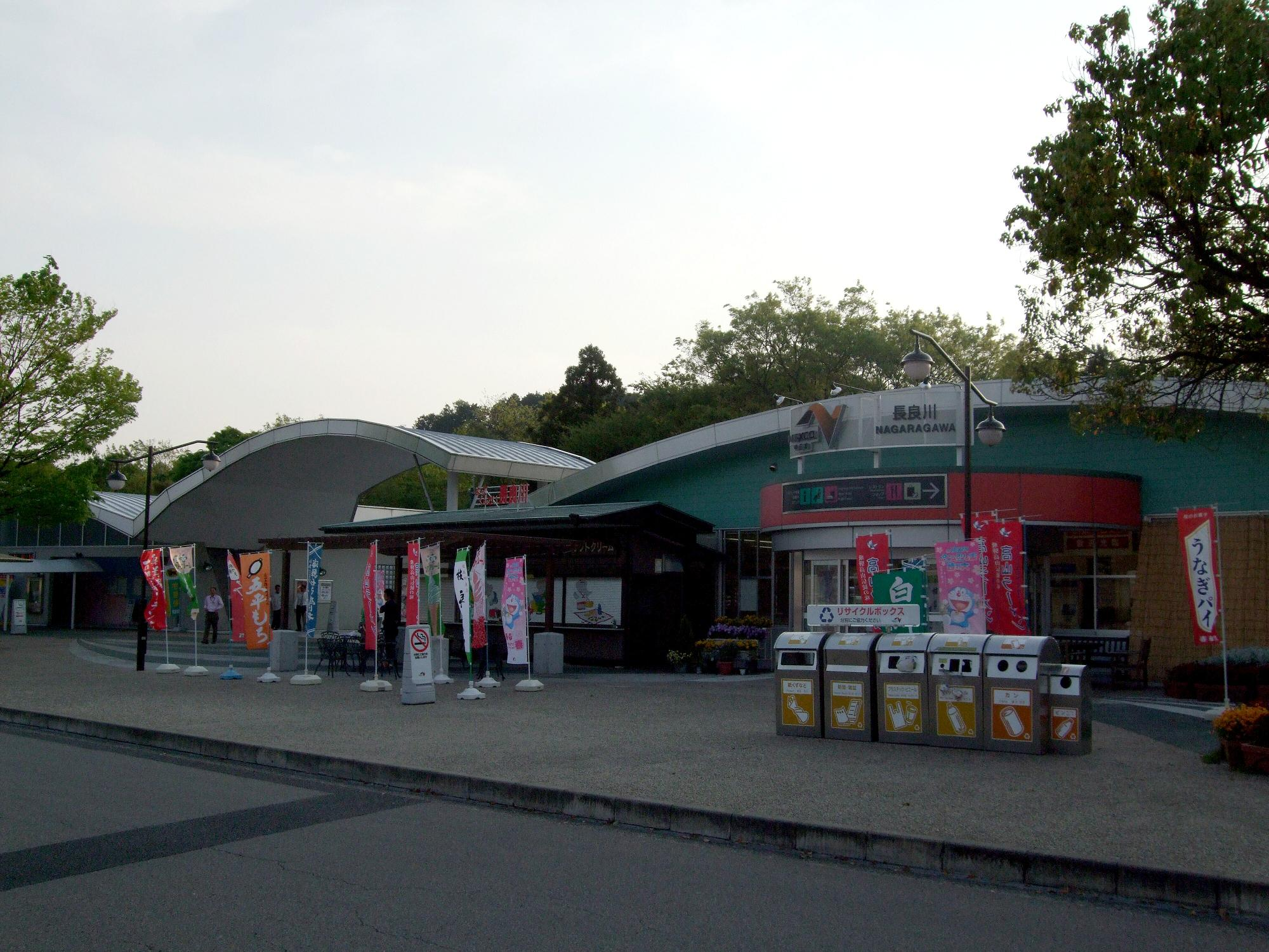 長良川サービスエリア 2008.4.27 投稿者が撮影